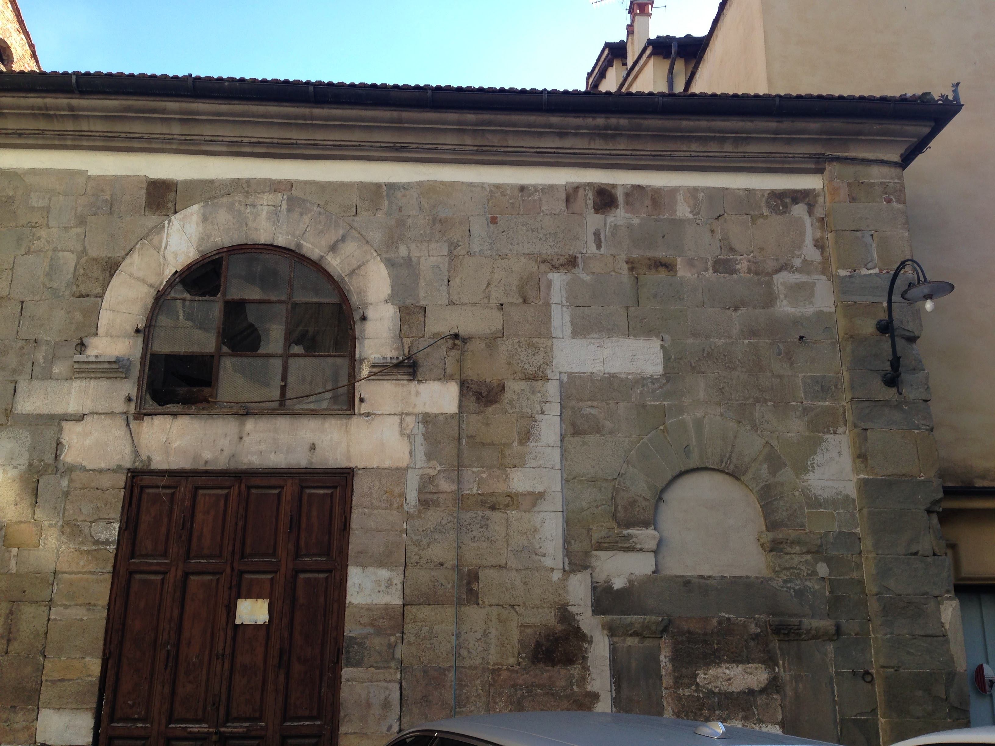 Facciata della chiesa di San Quirico all'Ulivo (sconsacrata), Piazza S. Quirico, Lucca